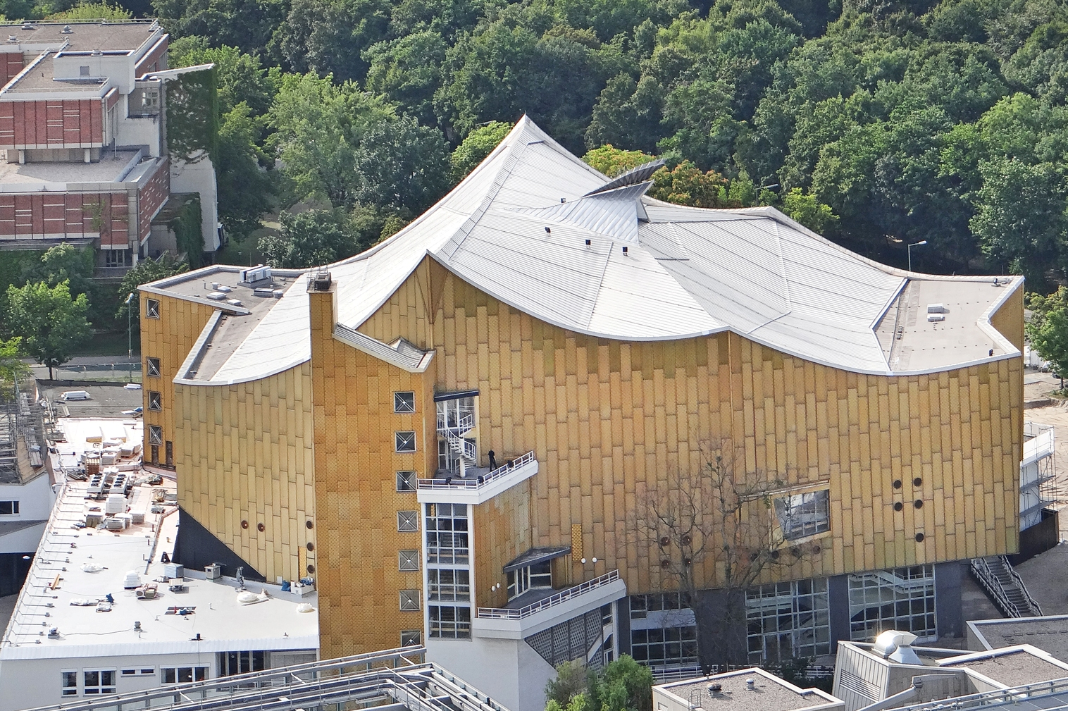 La bâtiment de la Philharmonie Kulturforum Ouvert en 1963, le bâtiment, avec un toit en forme de tente, et un espace intérieur devenu par la suite un modèle pour les salles de concert, a été conçu par l'architecte Hans Scharoun, qui a ainsi inauguré un nouveau style : l'architecture dite organique. En 1984 puis en 1988, Edgar Wisniewski, un proche d'Hans Scharoun a construit deux bâtiments adjacents dans le même style, l'un pour le musée des instruments de musique et l'autre pour les concerts de musique de chambre.